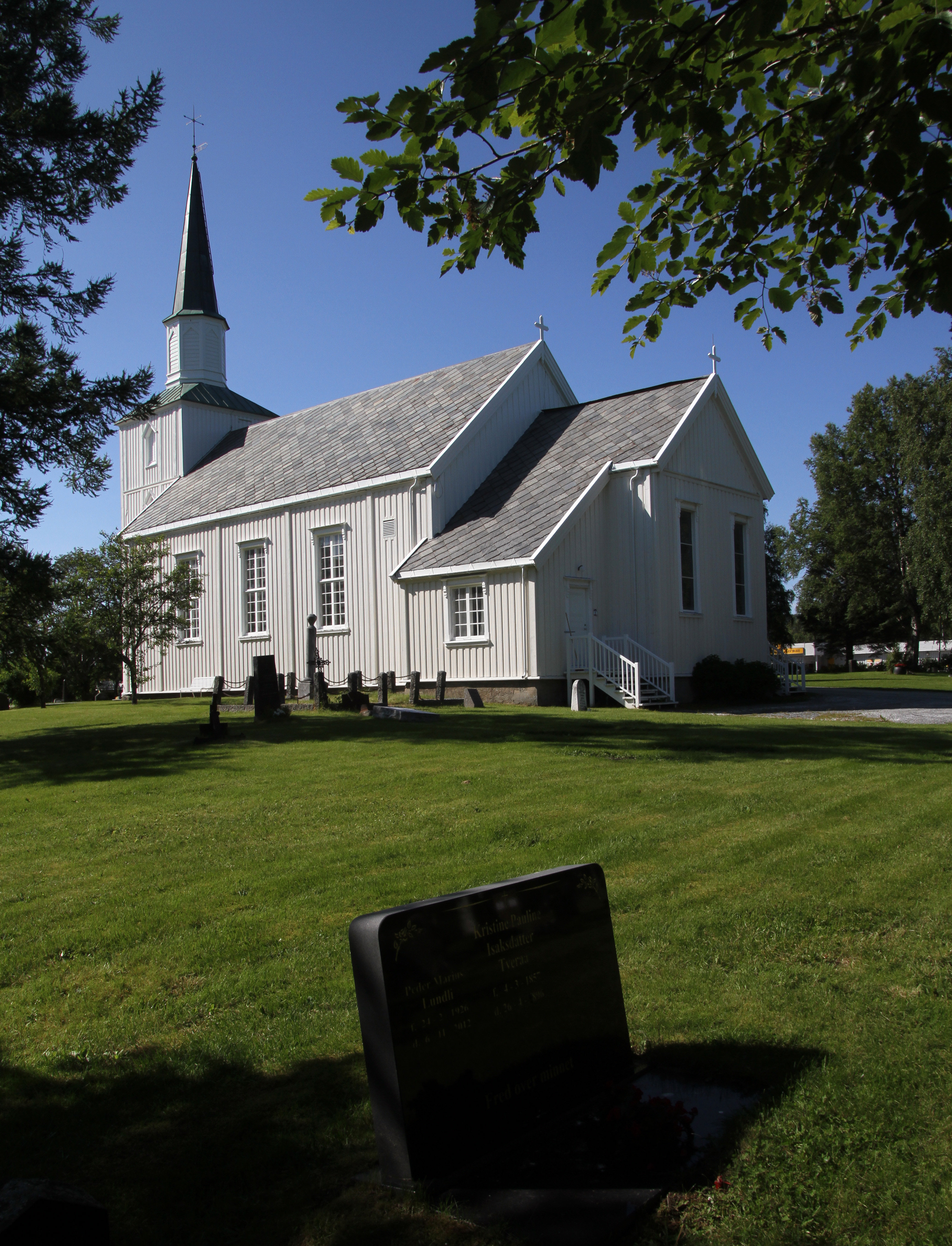 Kirche in Fauske in Norwegen